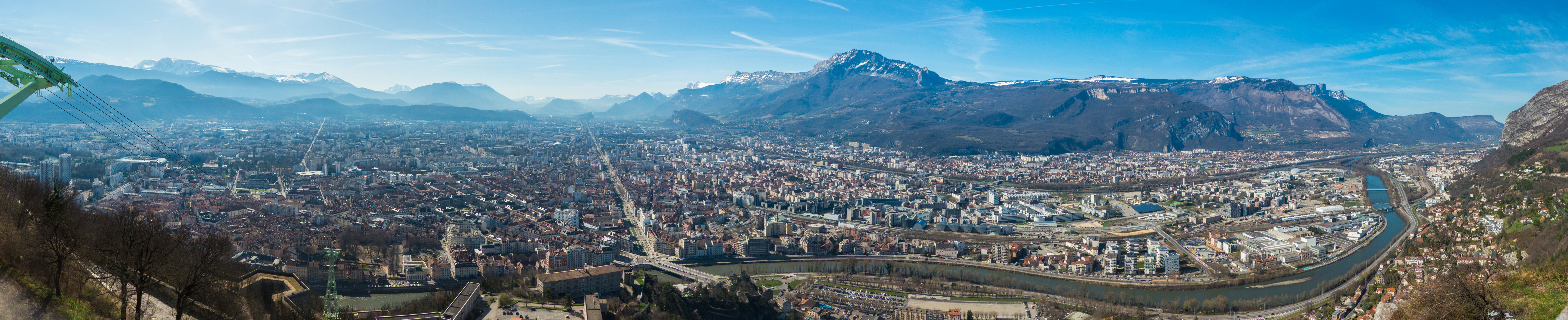 Vue panoramique de Grenoble au printemps depuis le fort de la Bastille.